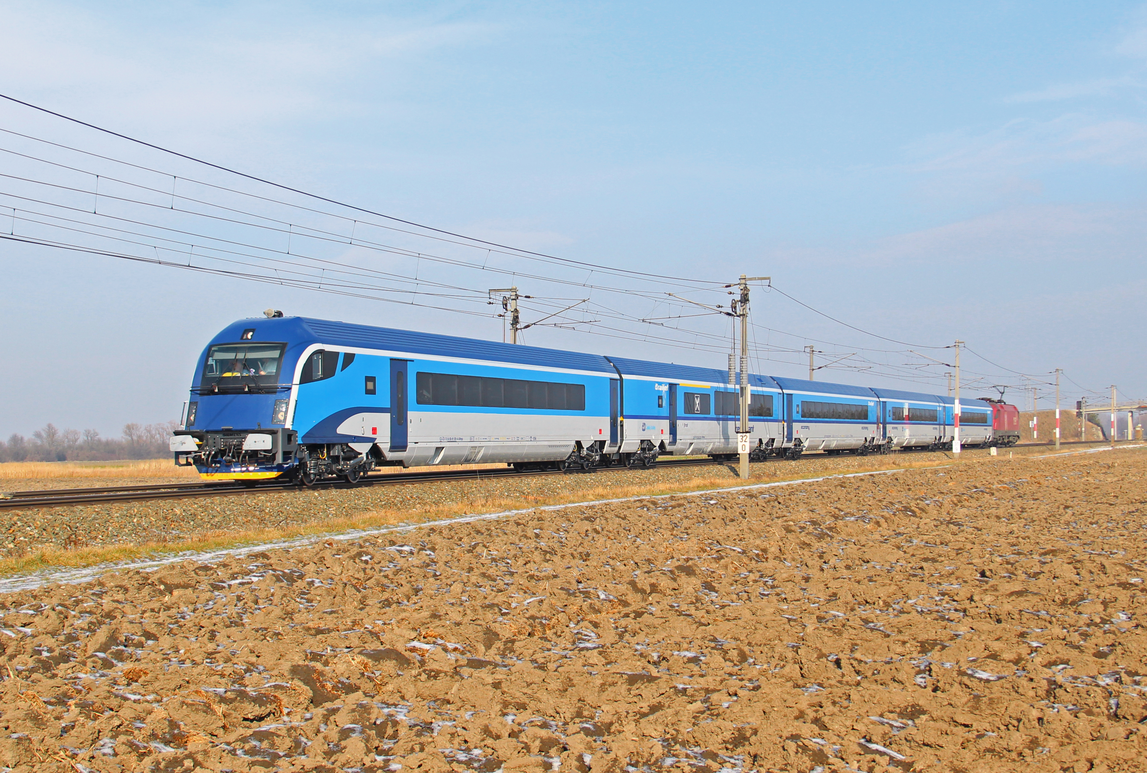 Probefahrt einer fünfteiligen ČD-Railjet-Garnitur von Wien nach Ebenfurth, hier kurz nach Wampersdorf